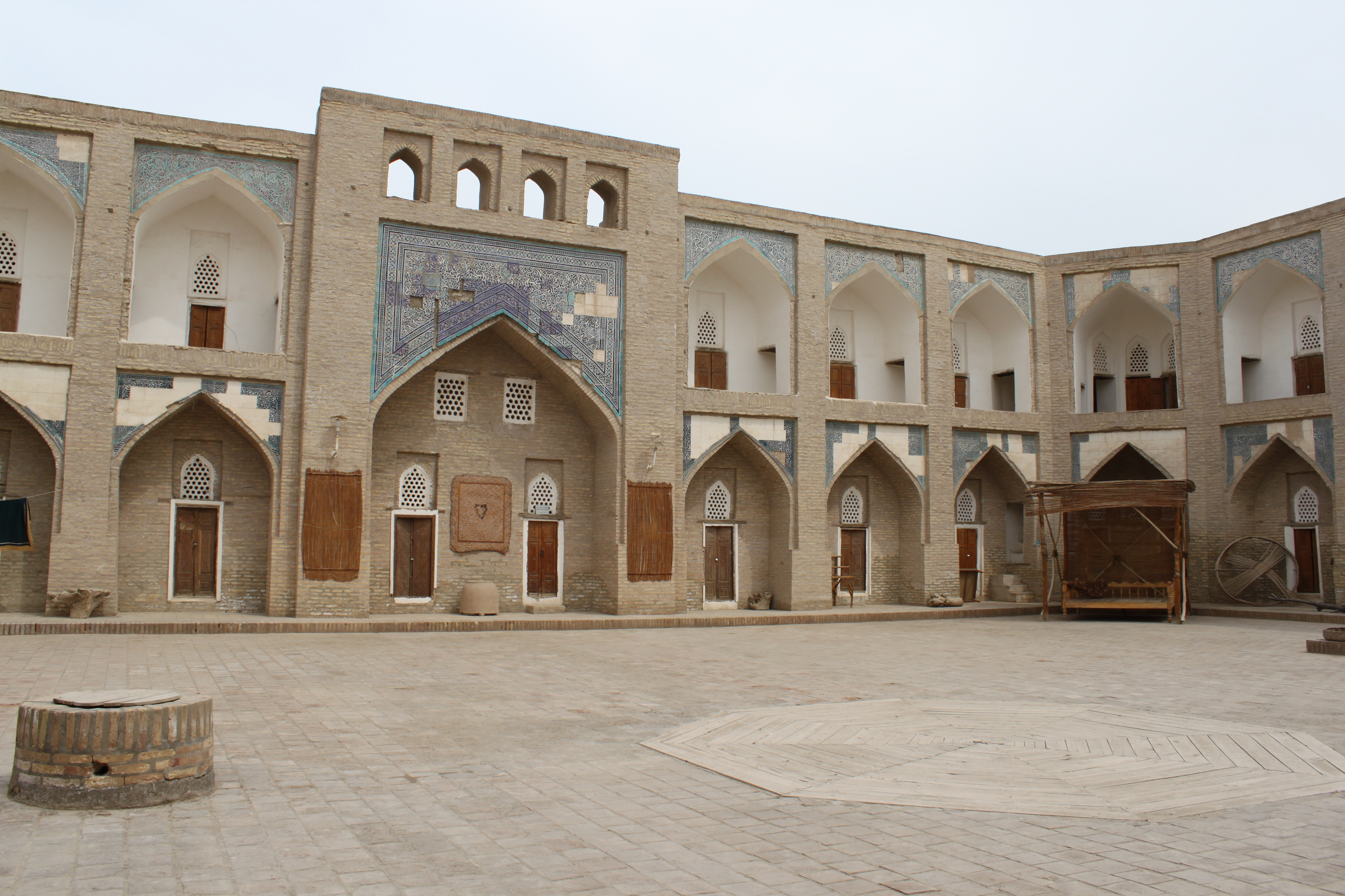 Vue sur la cour intérieure de la madrasa Alla Kouli Khan à Khiva